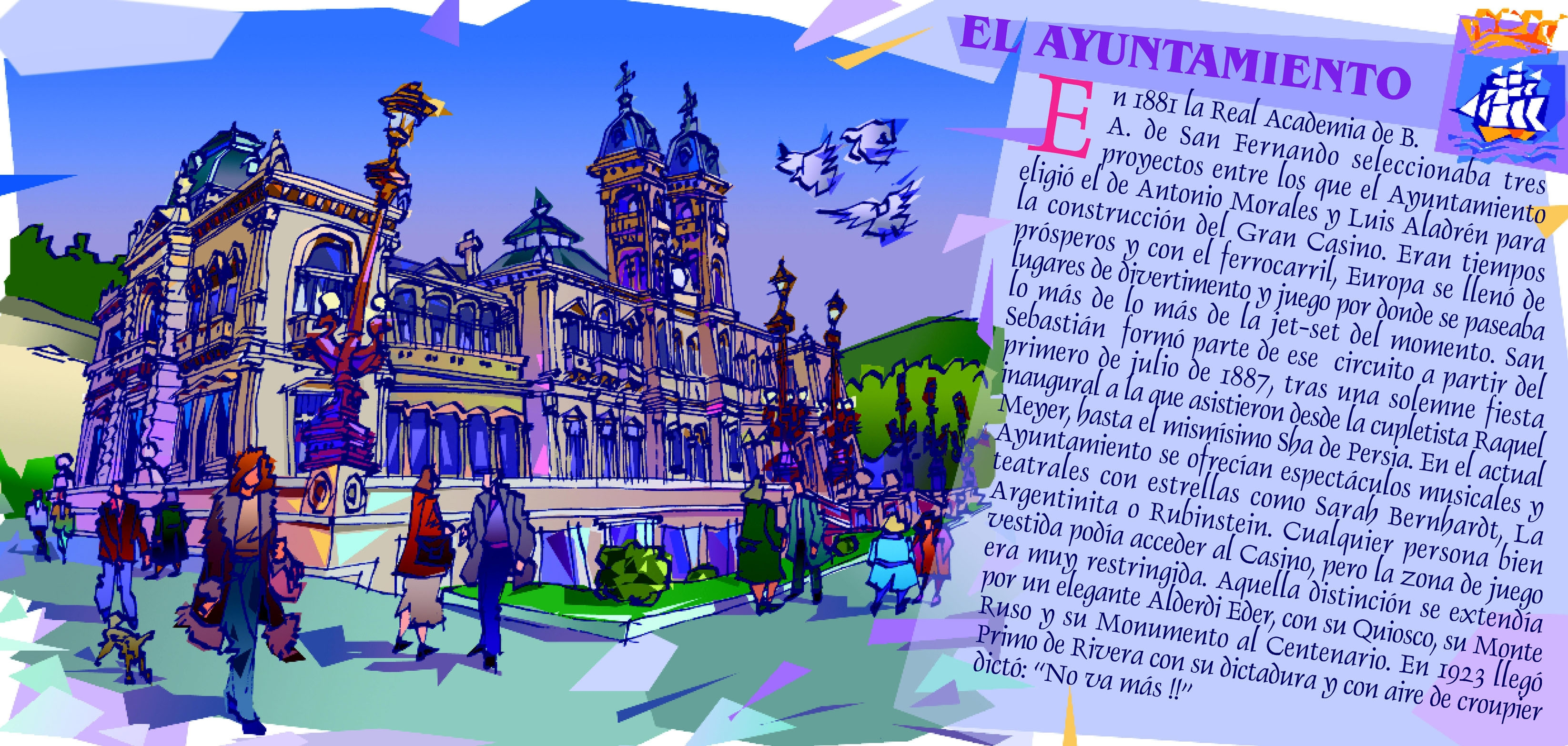 Josemari Alemán